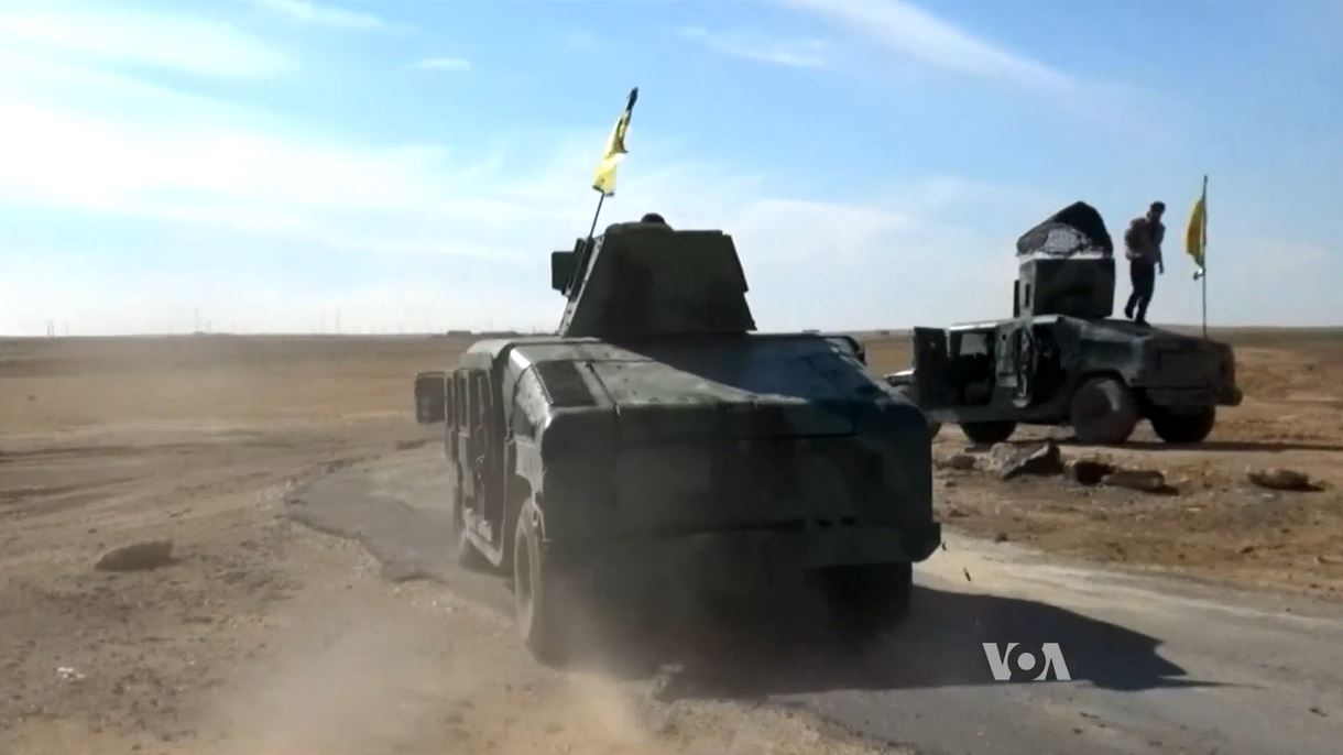 Membres des YPG à la bataille de al-Hol en Syrie en 2015.